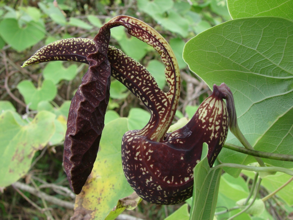 Aristolochia galeata - ARISTOLOCHIACEAE - Parque Olhos D'Água - Brasília - Distrito Federal - Brasil.